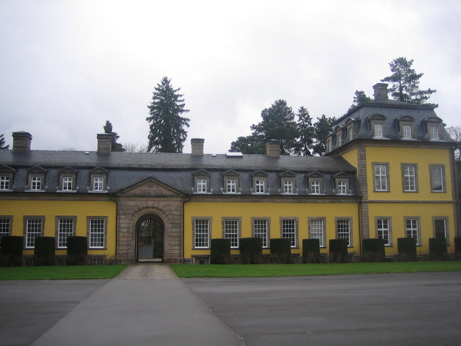 Seitenflügel Schloss Arolsen in Hessen